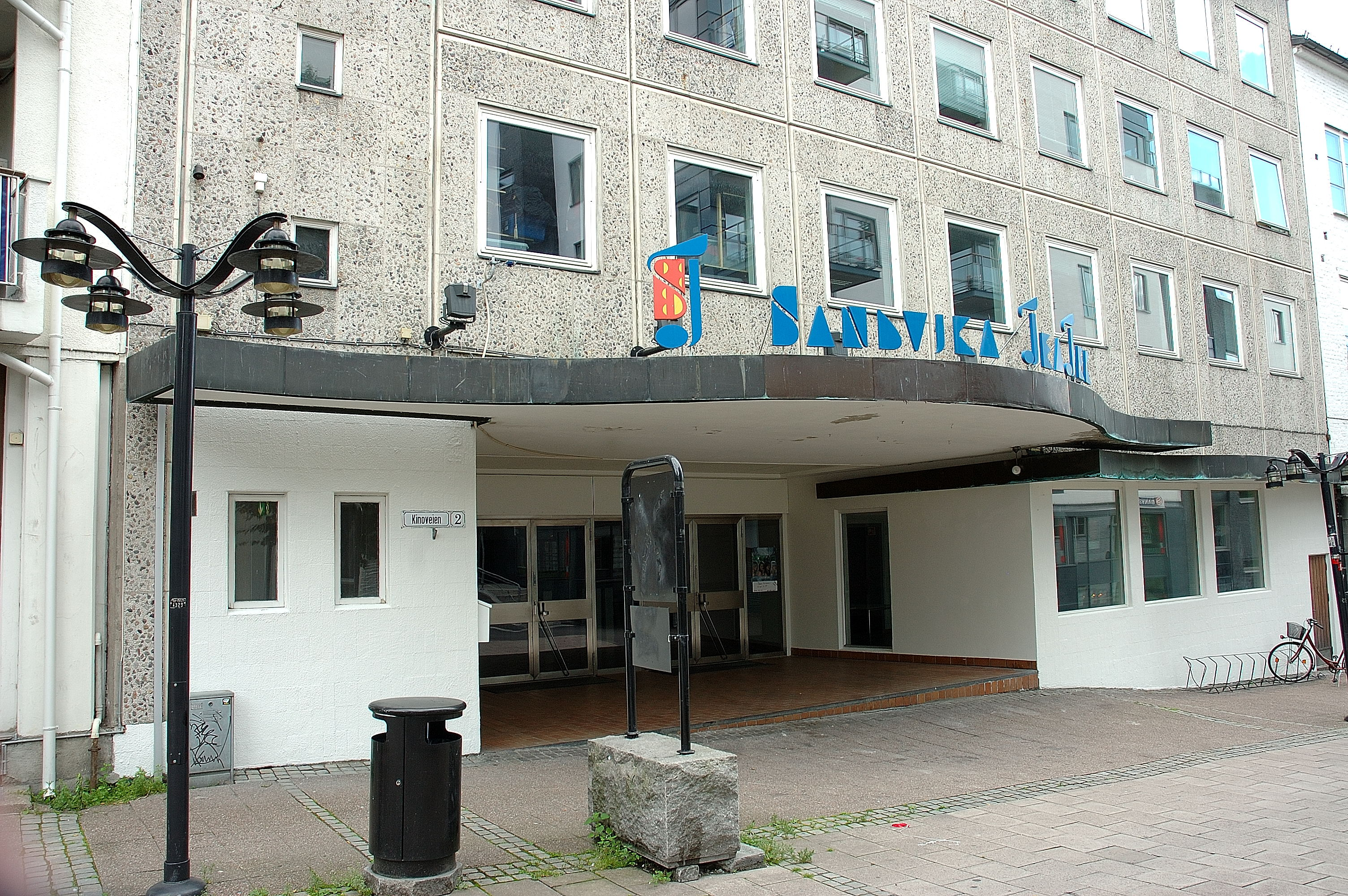 Sandvika Theatre Sandvika Teater